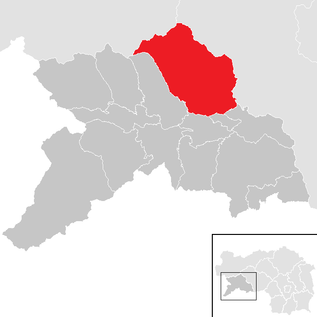 Lage von Oberwölz im Bezirk Murau